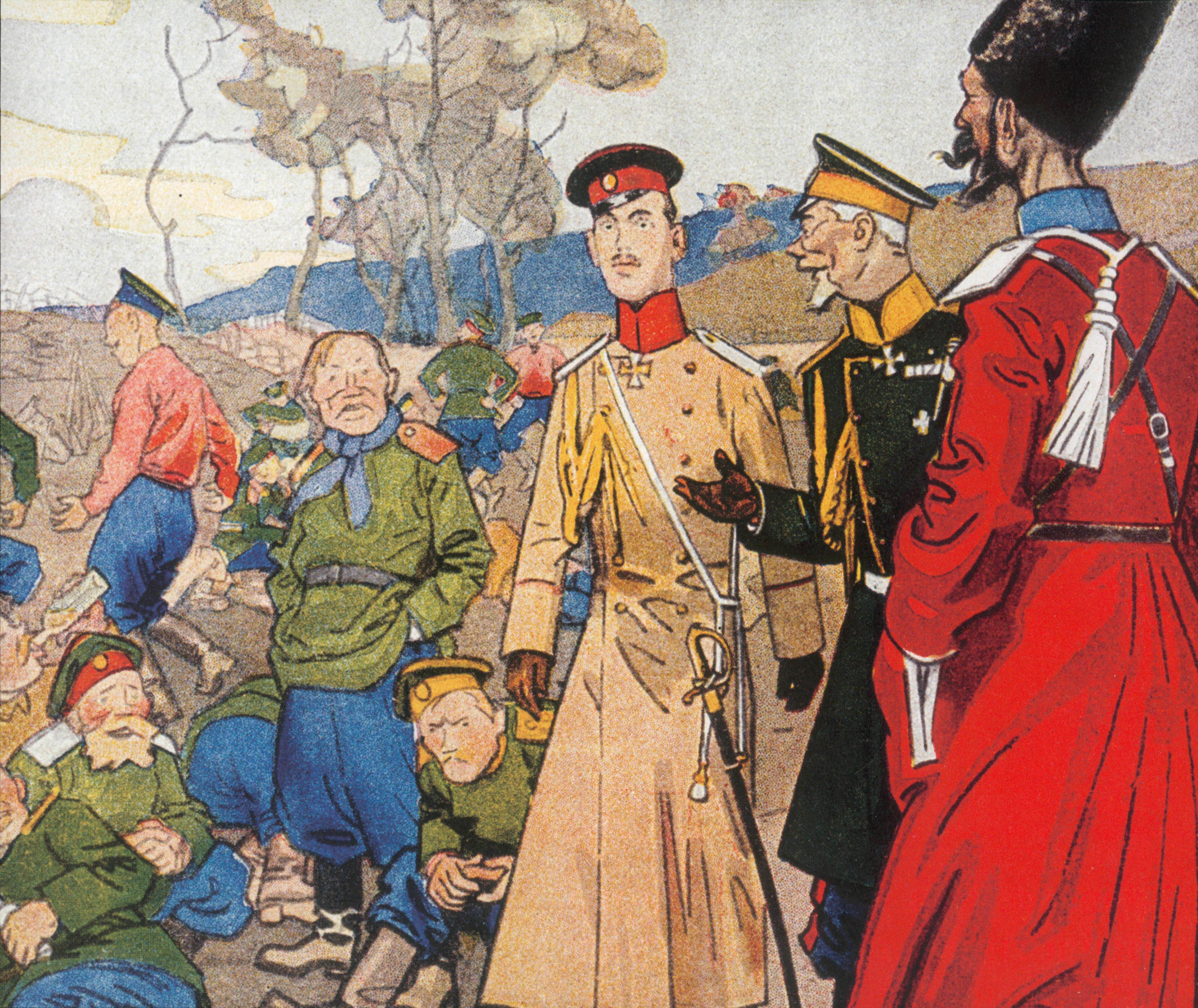 Немецкая карикатура на В. Кн. Михаила Александровича Романова, начала 1917 года, перепечатанная в русской печати после Февральской революции. Адъютант-генерал - великому князю: "Вы в безопасности, Михаил Александрович. Армия сегодня бастует!"